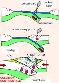 Muga konbergente baten mugimenduak denboran zehar. Bertan subdukzio-eremua nola bihurtzen den kolisio eremu batean ikusten da.